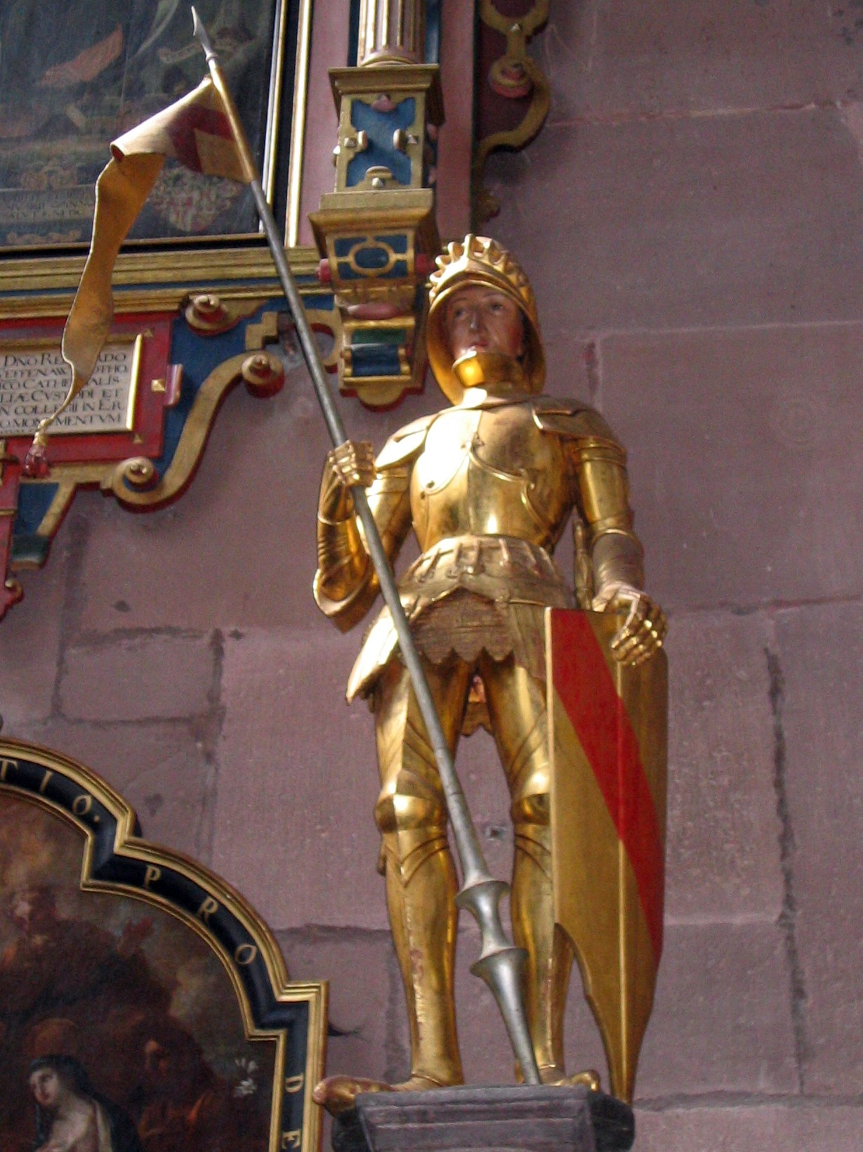 Brunnen zu Ehren des Markgrafen Bernhards II. von Baden im Freiburger Münster - Nahaufnahme